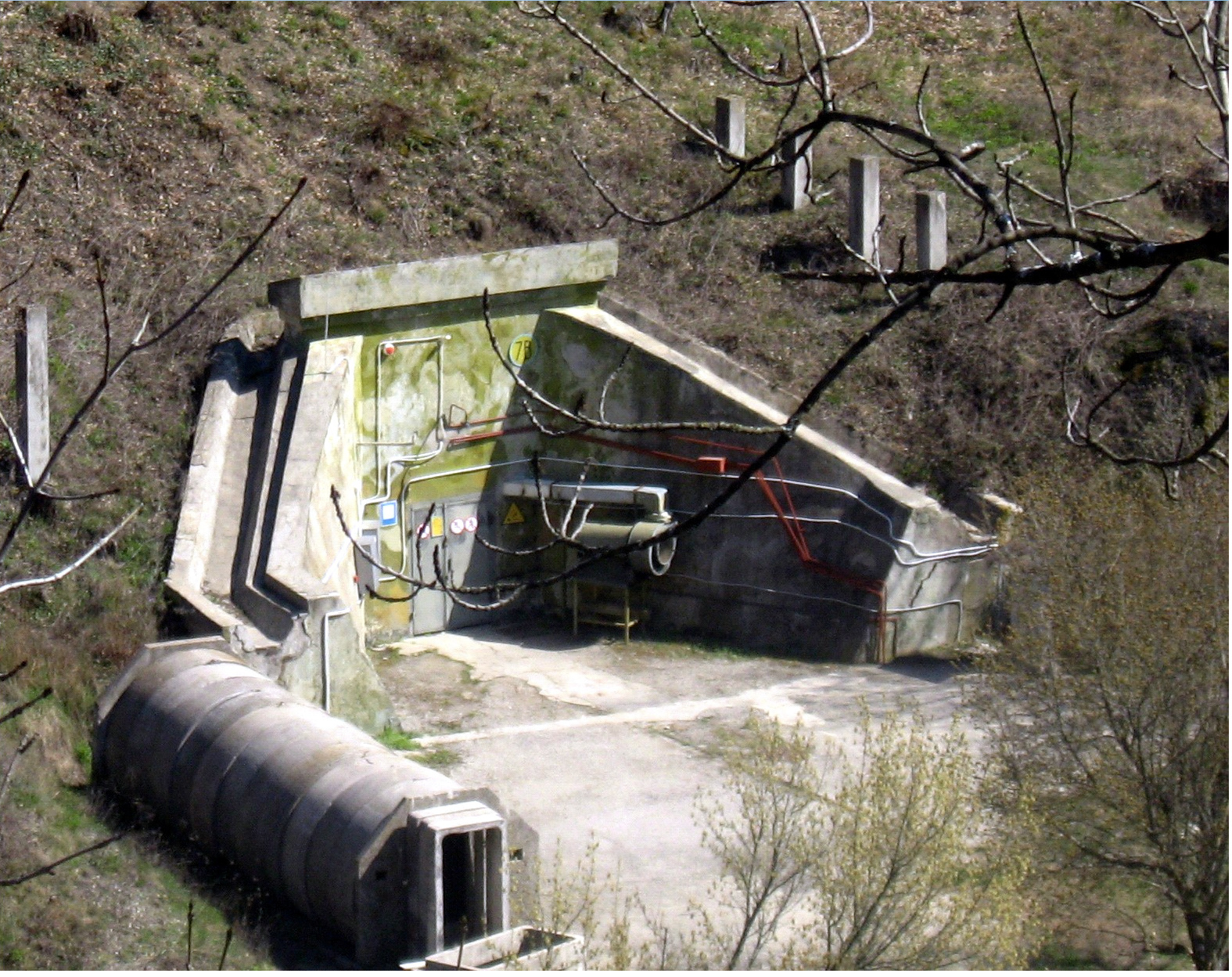 Хранилище радиоактивных отходов в Краснокаменке Феодосийского горсовета. Крым. Украина.